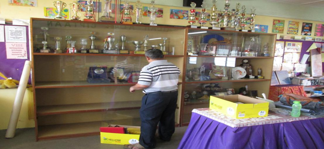 Proses Sebelum 7